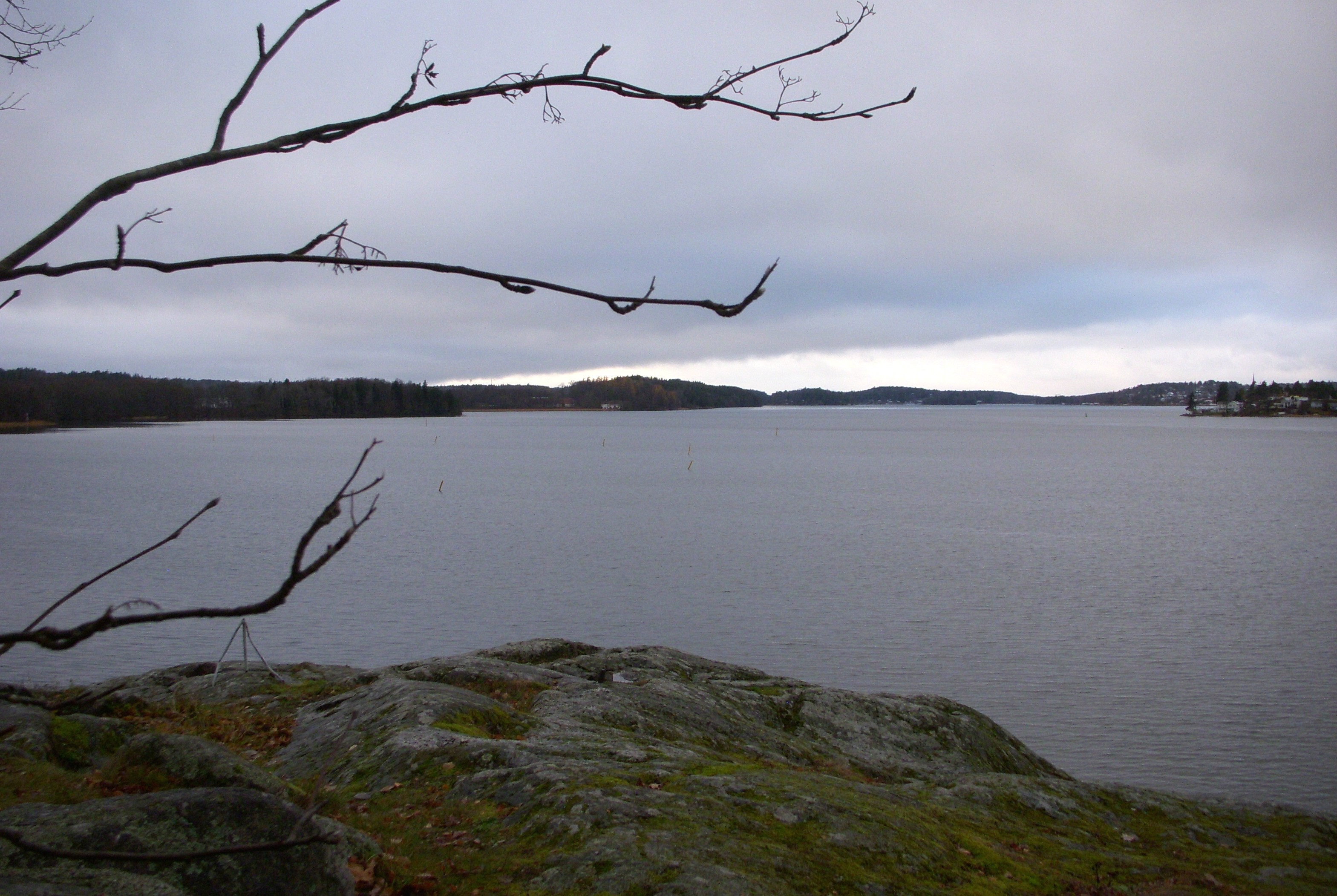 Rödstensfjärden i Mälaren i höjd med Norsborgs vattenverk, vy mot väst